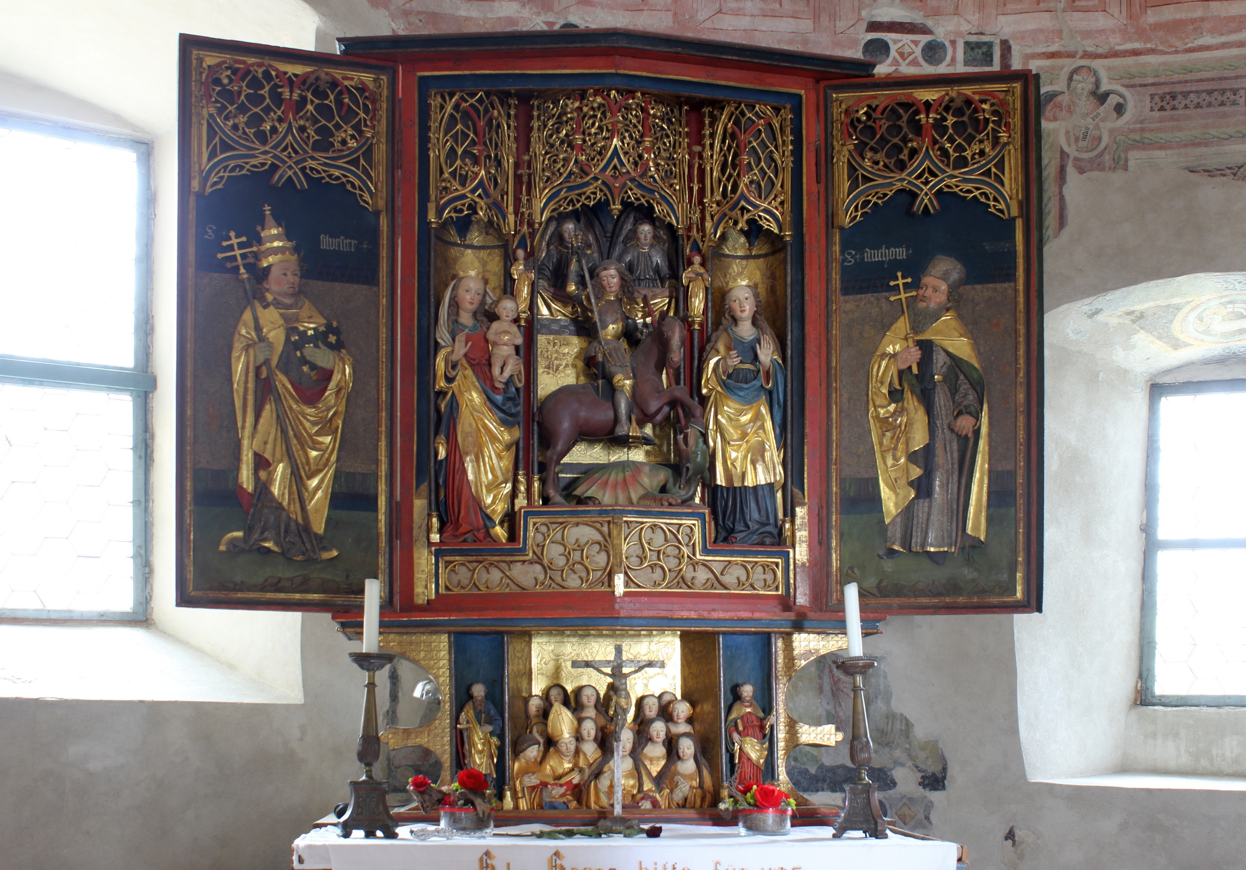 Schnatterpeckaltar in St. Georg in Schenna